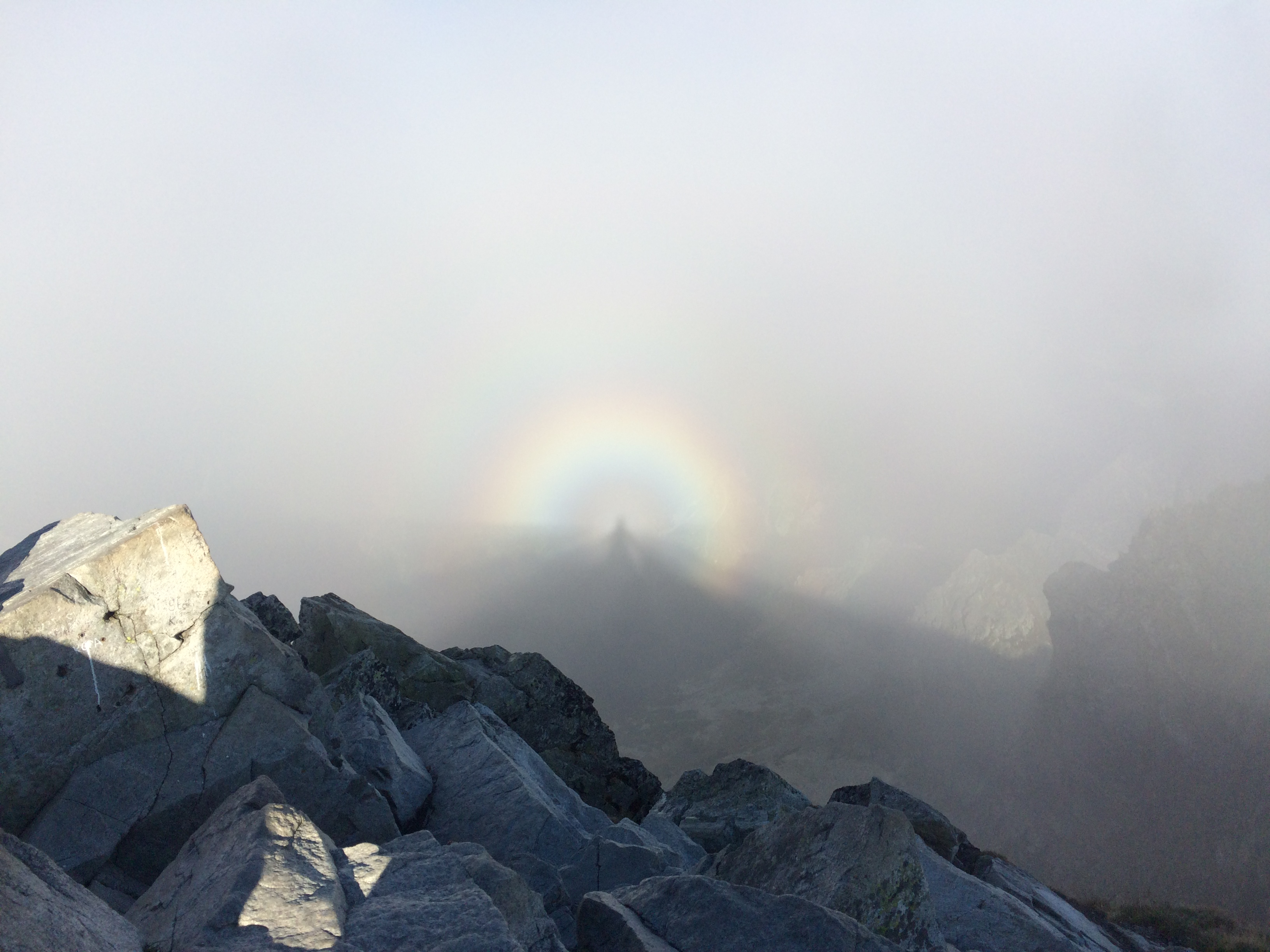 Спостережено на вершині гори Риси (Польща) у вересні 2017р.